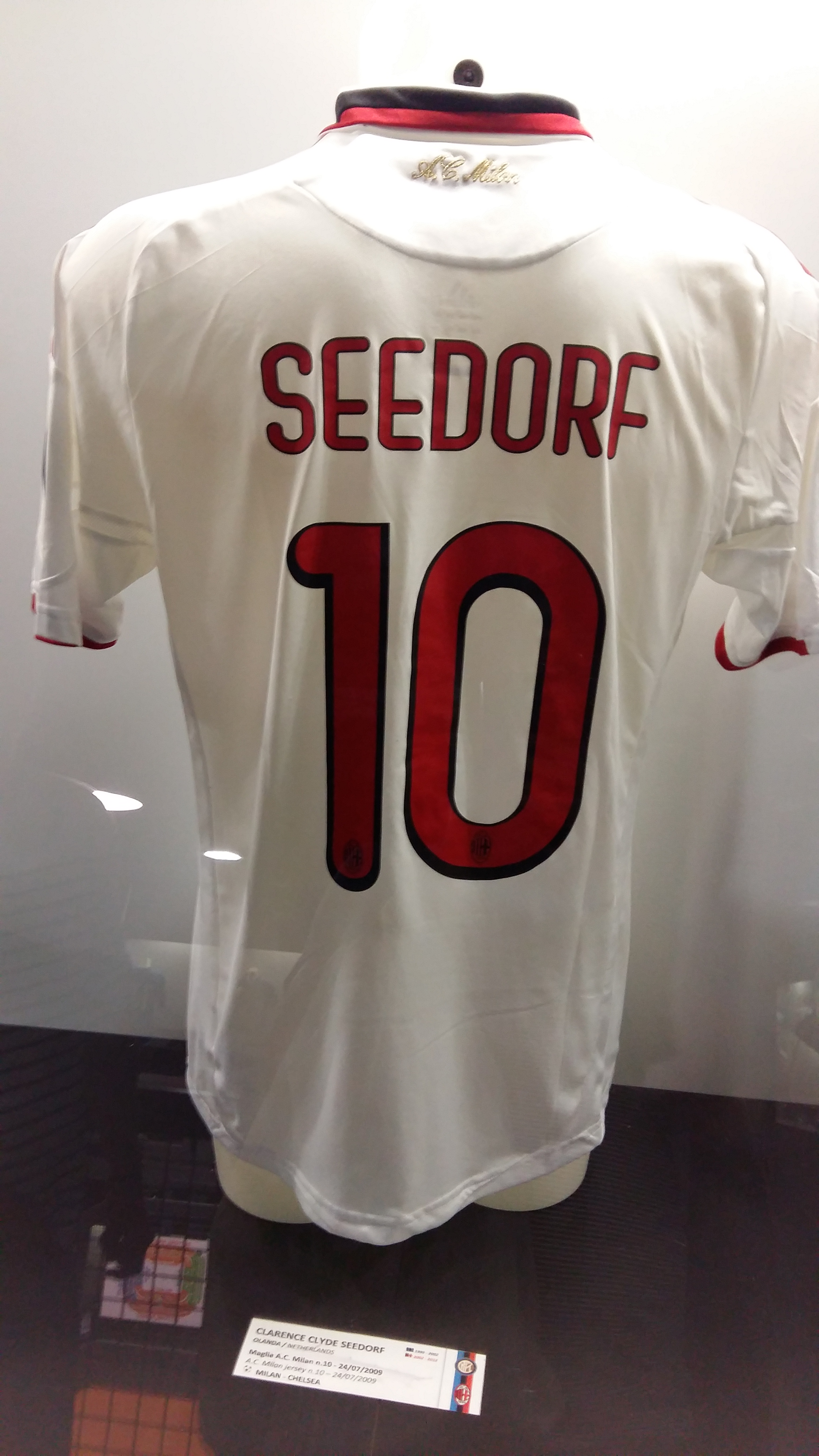 Футболка Кларенса Зеедорфа (2009 год) в музее Сан-Сиро.